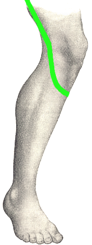 Pflasterstreifenverlauf